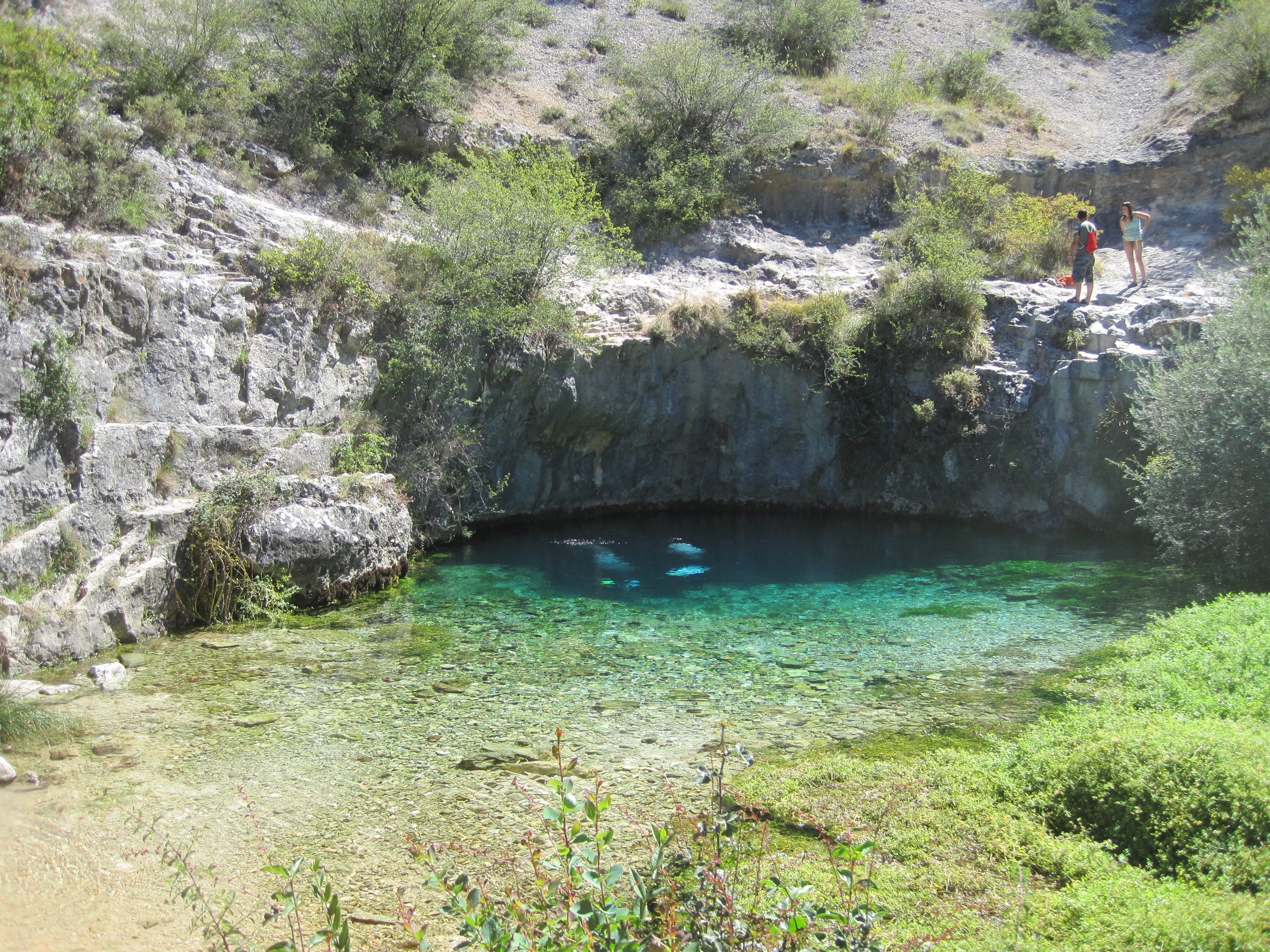 Vista del Pozo Azul, en la localidad burgalesa de Covanera, España.